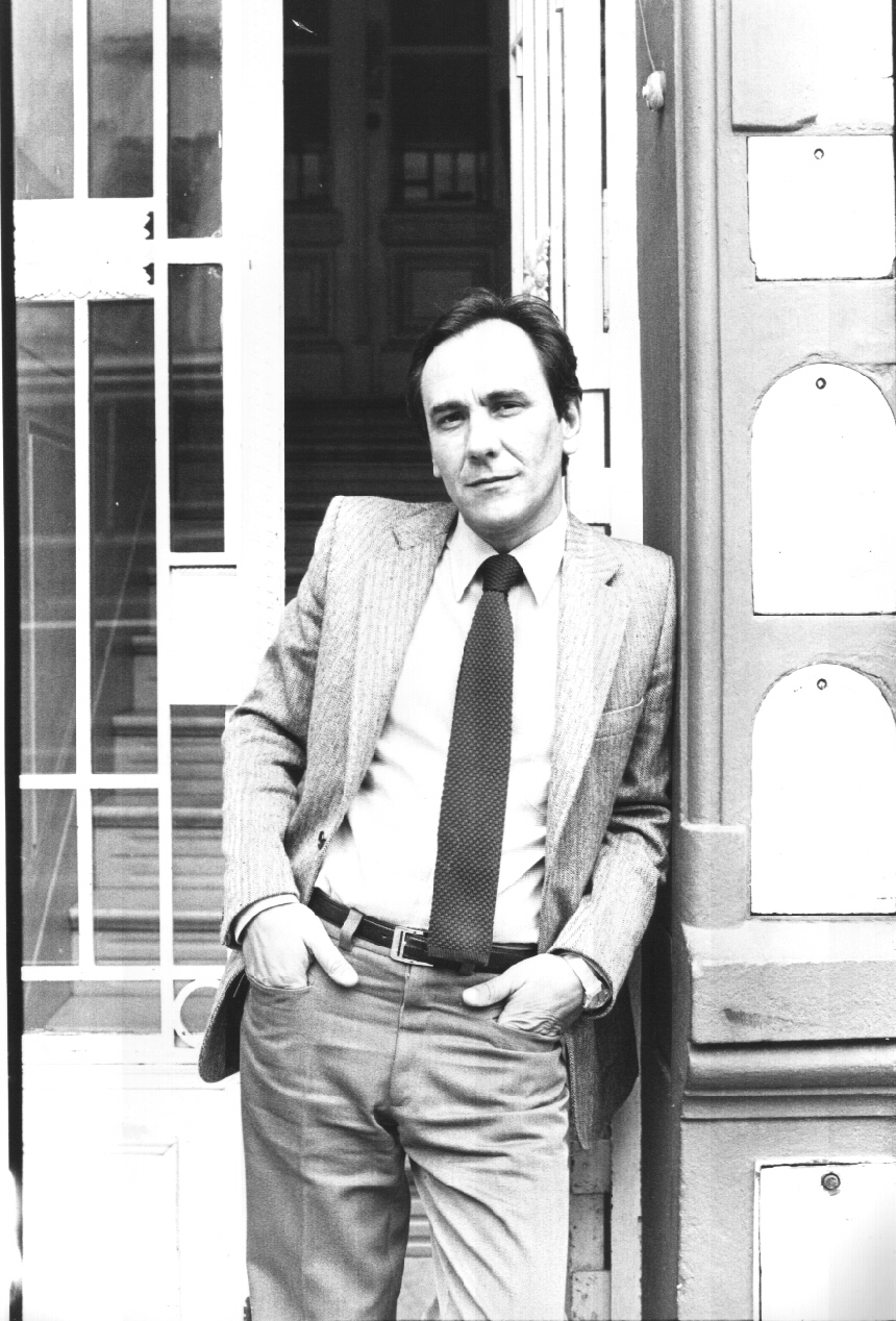 Luis Alposta en Buenos Aires, año 1981.